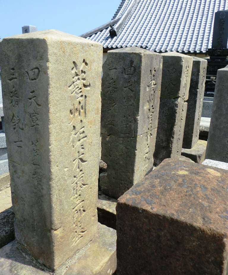 海沿いの修行院には、四基の墓が並び、「回天軍第一起神機隊 銃士」と戦死者の名まえが刻まれている。東日本大震災の震度６弱で、揺れて倒壊していたが、地元の石材店が無償で修理してくれていた。